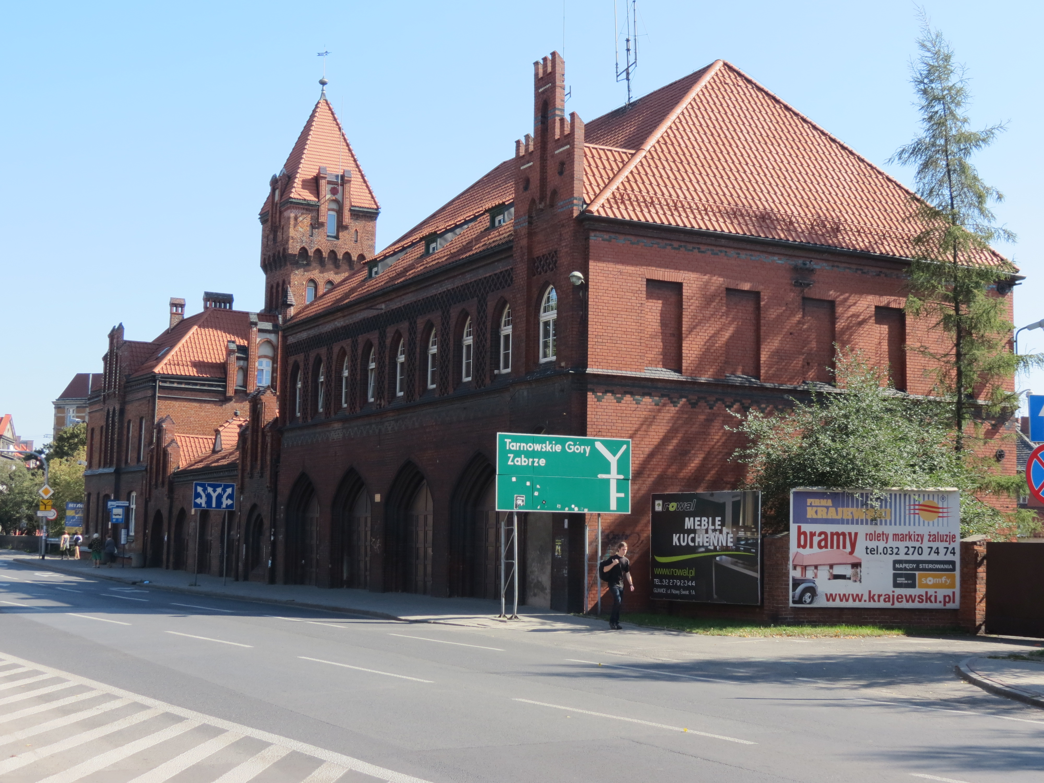 Gliwice, ul. Wrocławska 1 - zespół budynków Straży Pożarnej z przełomu XIX i XX w. (zabytek nr A/1375/88)